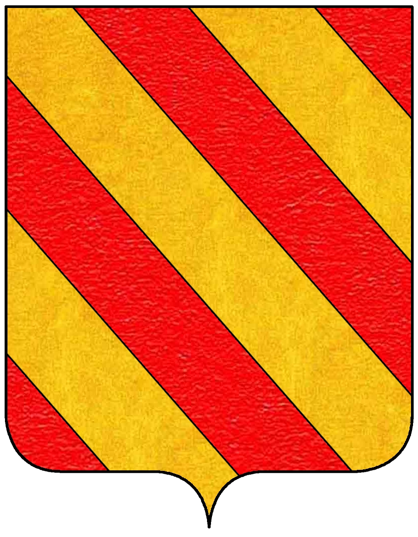 Stemma della famiglia Adilardi